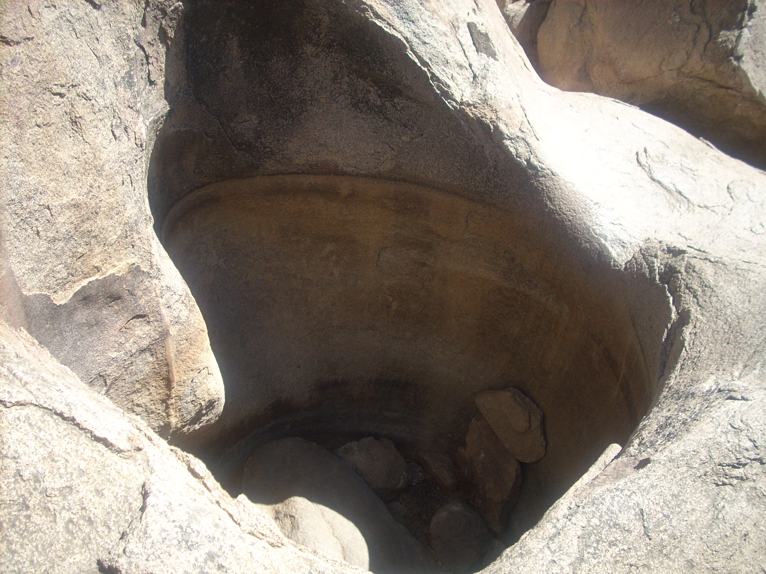 Baño del Inca en Ovalle IV Región